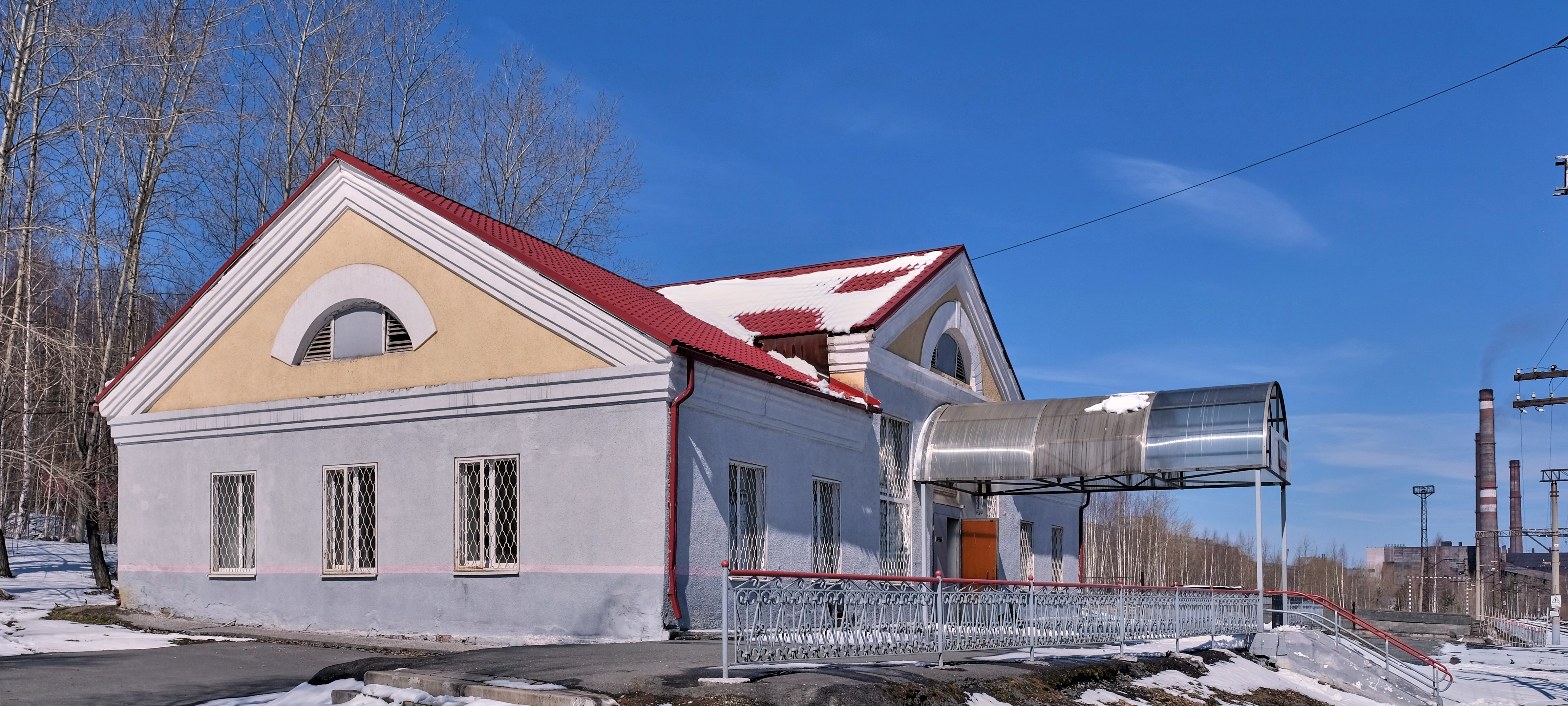 Вокзал станции Качканар Свердловской железной дороги